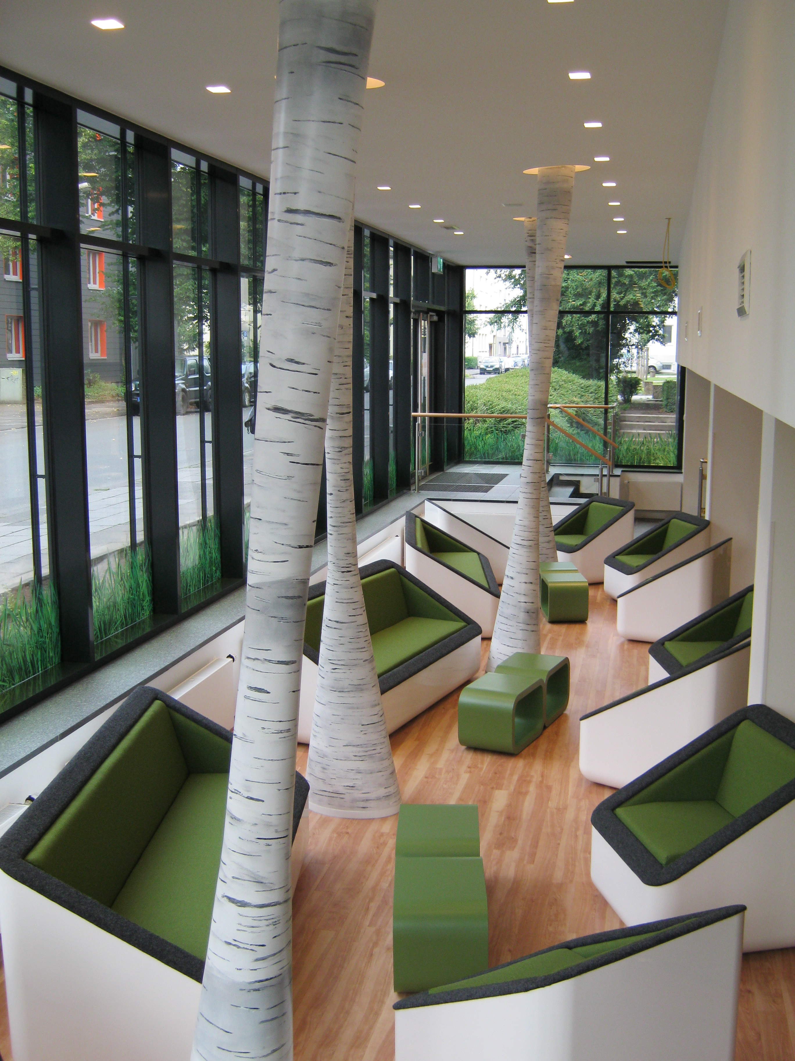 Insgrüne Duisburg 120815 001 (c) Tchibo (38)